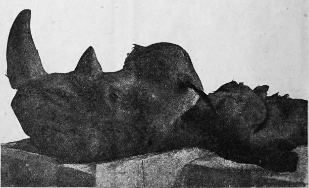 Голова дінювіального носорога, цїла, з шкірою, викопана в селї Старунї на галицькім Підкірпатю.